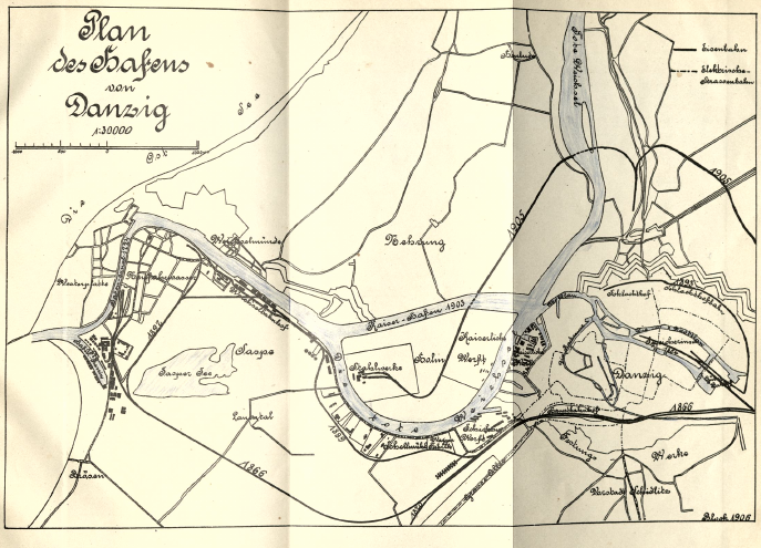 Plan des Hafens von Danzig 1906 gezeichnet von Block